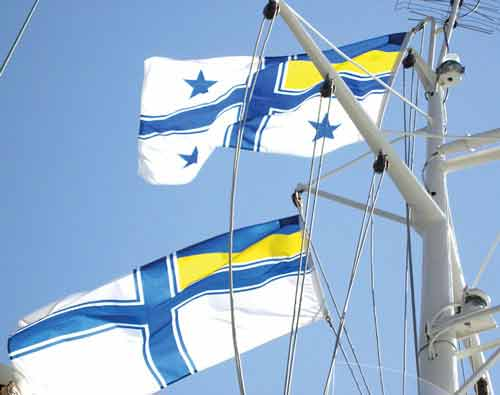 Ukrainian Navy flags